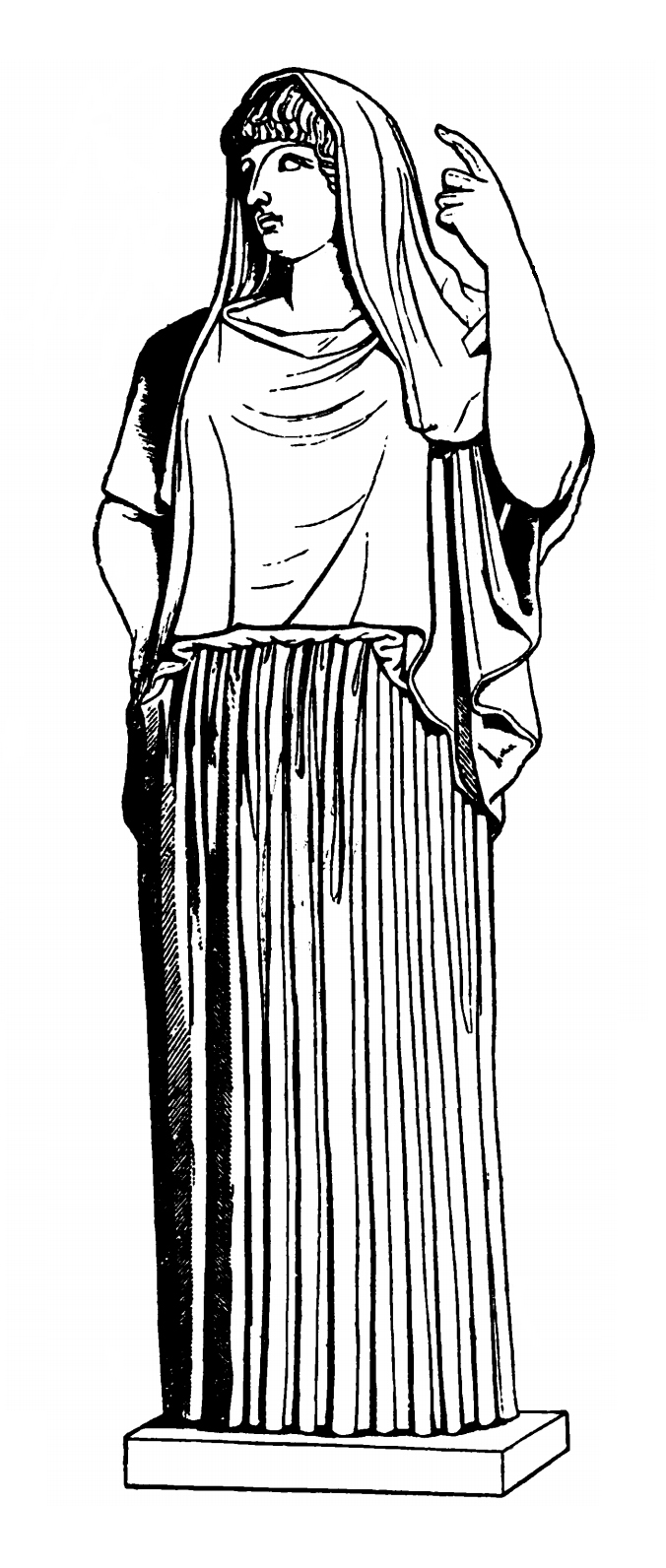 Vesta Giustiniani